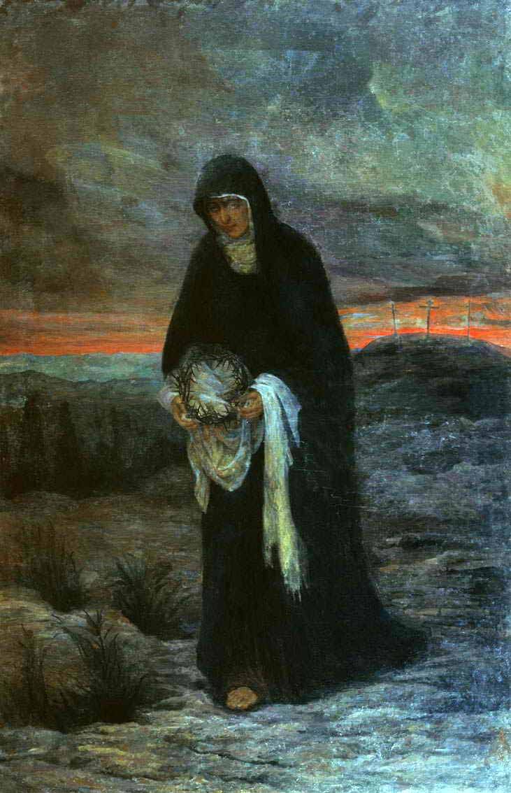 Боткин Михаил Петрович. «Скорбящая Богоматерь»